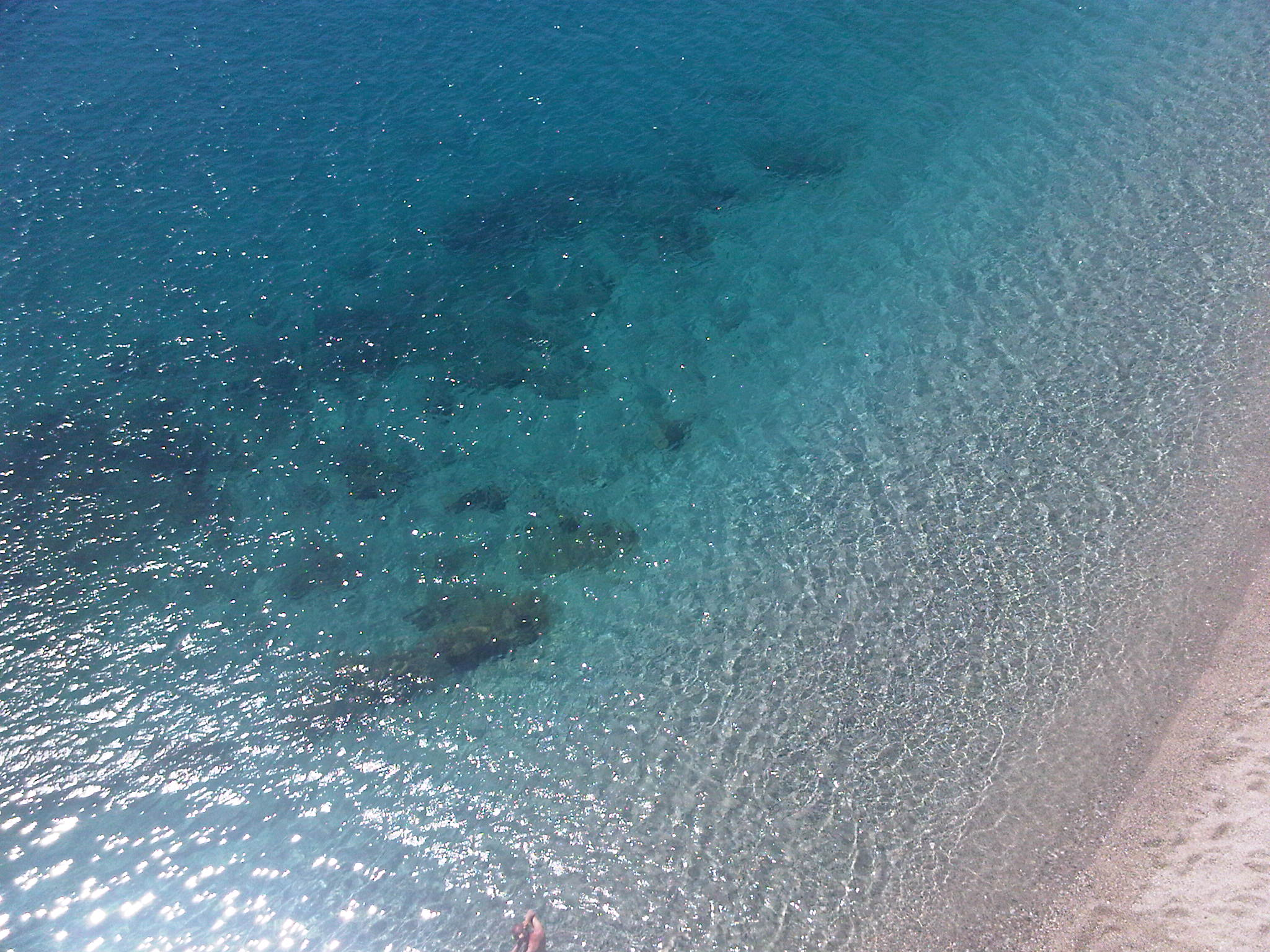 Bergeggi